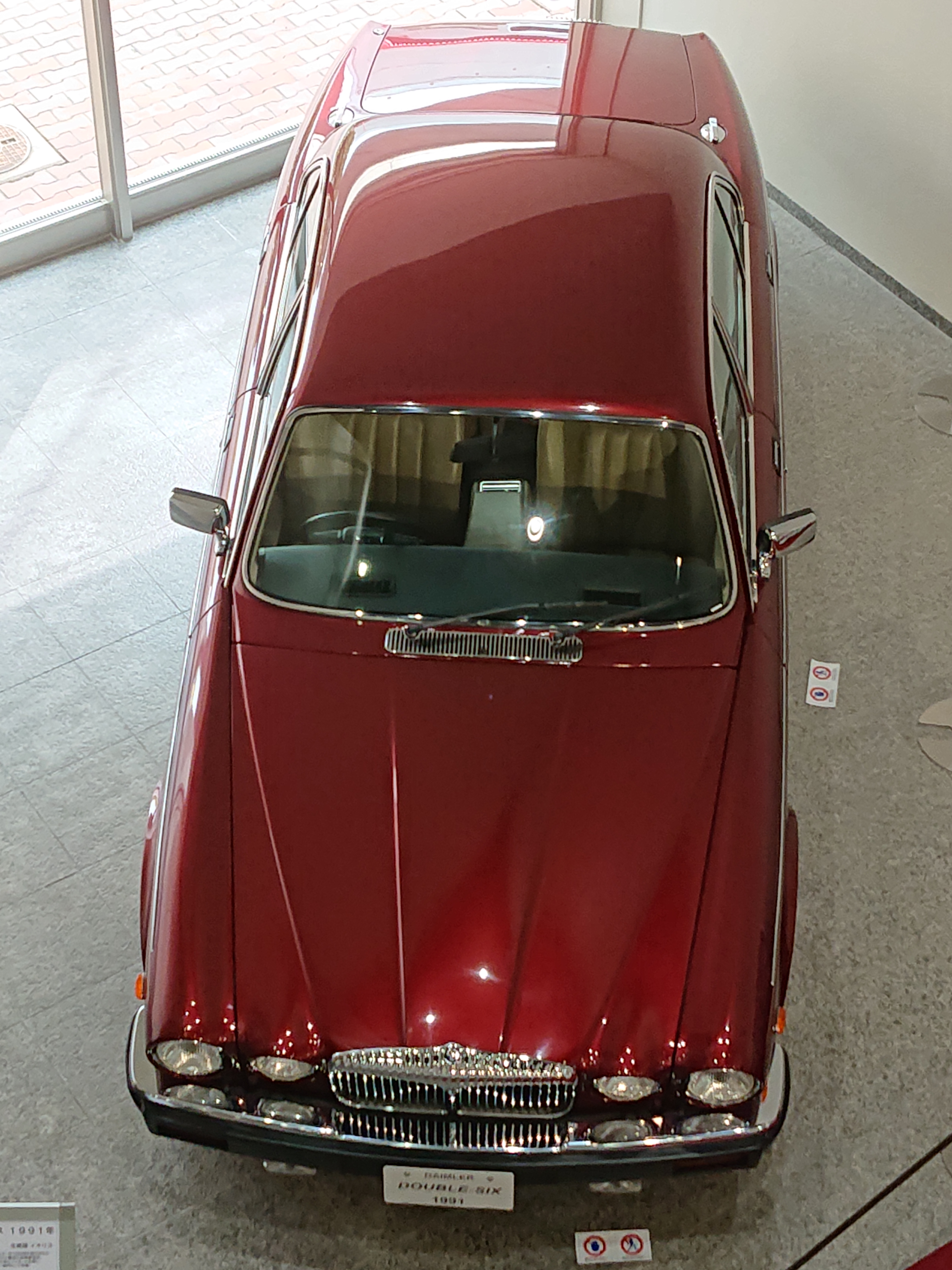 デイムラーダブルシックス（1991年輸入）を2019年4月21日上方より撮ったもの。